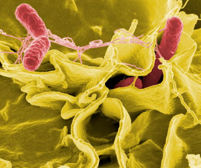 Salmonella bacteria, a common cause of foodborne disease, invade an immune cell. Credit: NIAID